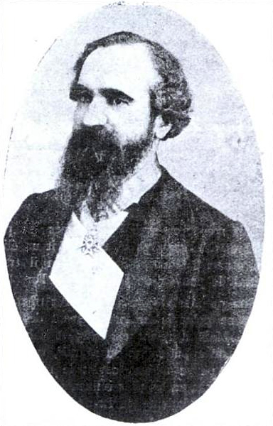 Orélie Antoine de Tounens (La Chaise, Francia; 12 de mayo de 1825 — Tourtoirac, Francia - 19 de septiembre de 18782 ), en español usualmente citado como Orelio Antonio o Aurelio Antonio3 , fue un abogado y aventurero francés que asumió el titulo de Rey de la Araucanía y la Patagonia. Se disputa si Tounens se auto-proclamo rey o fue elegido por un grupo de loncos (jefes mapuches).